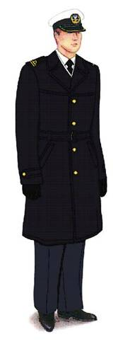 Ubiór wyjściowy żołnierza Marynarki Wojennej. Rozporządzenie Ministra Obrony Narodowej w sprawie wzorów oraz noszenia umundurowania i oznak wojskowych przez żołnierzy zawodowych i kandydatów na żołnierzy zawodowych.